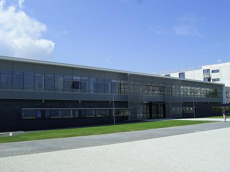 École des officiers du commissariat de la marine, à côté du campus de l'École navale, à Lanvéoc.